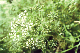 La Pimpinella Anisum : fleurs de l'anis vert